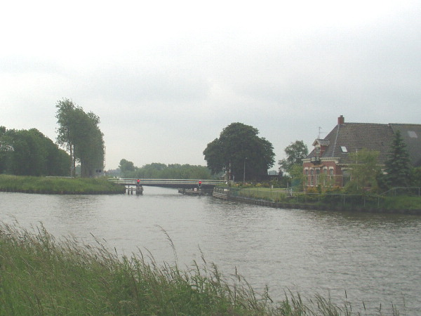 zelf gemaakt op 3/6/2005. Het Hoendiep (Gronings: Houndaip) is een kanaal gelegen tussen de stad Groningen en Zuidhorn (Noordhornerga).